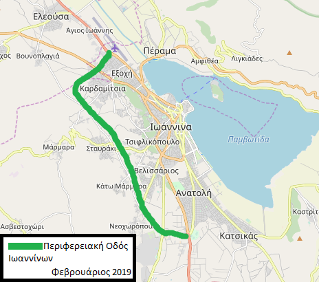 Ο χάρτης της περιφερειακής οδού Ιωαννίνων This map may be incomplete, and may contain errors. Don't rely solely on it for navigation.